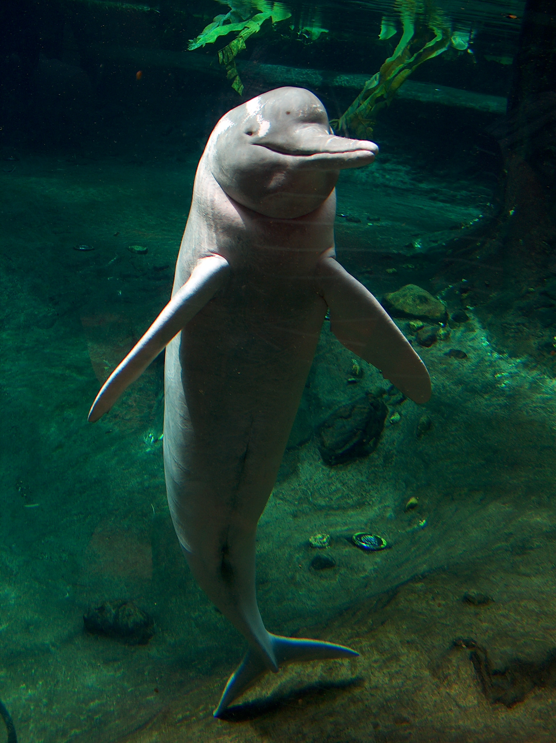 Orinoko, der Amazonas-Flussdelphin im Zoo Duisburg